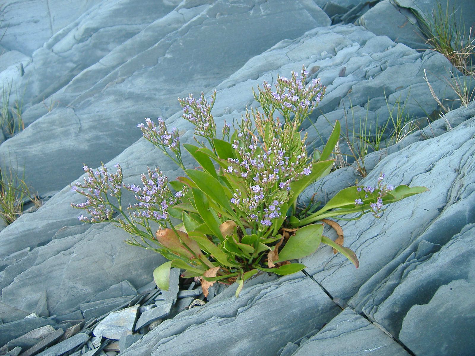 Photographie d'un Limonium carolinianum [syn. Limonium nashii], plante de la famille des Plumbaginaceae, prise à l'Île aux Basques.